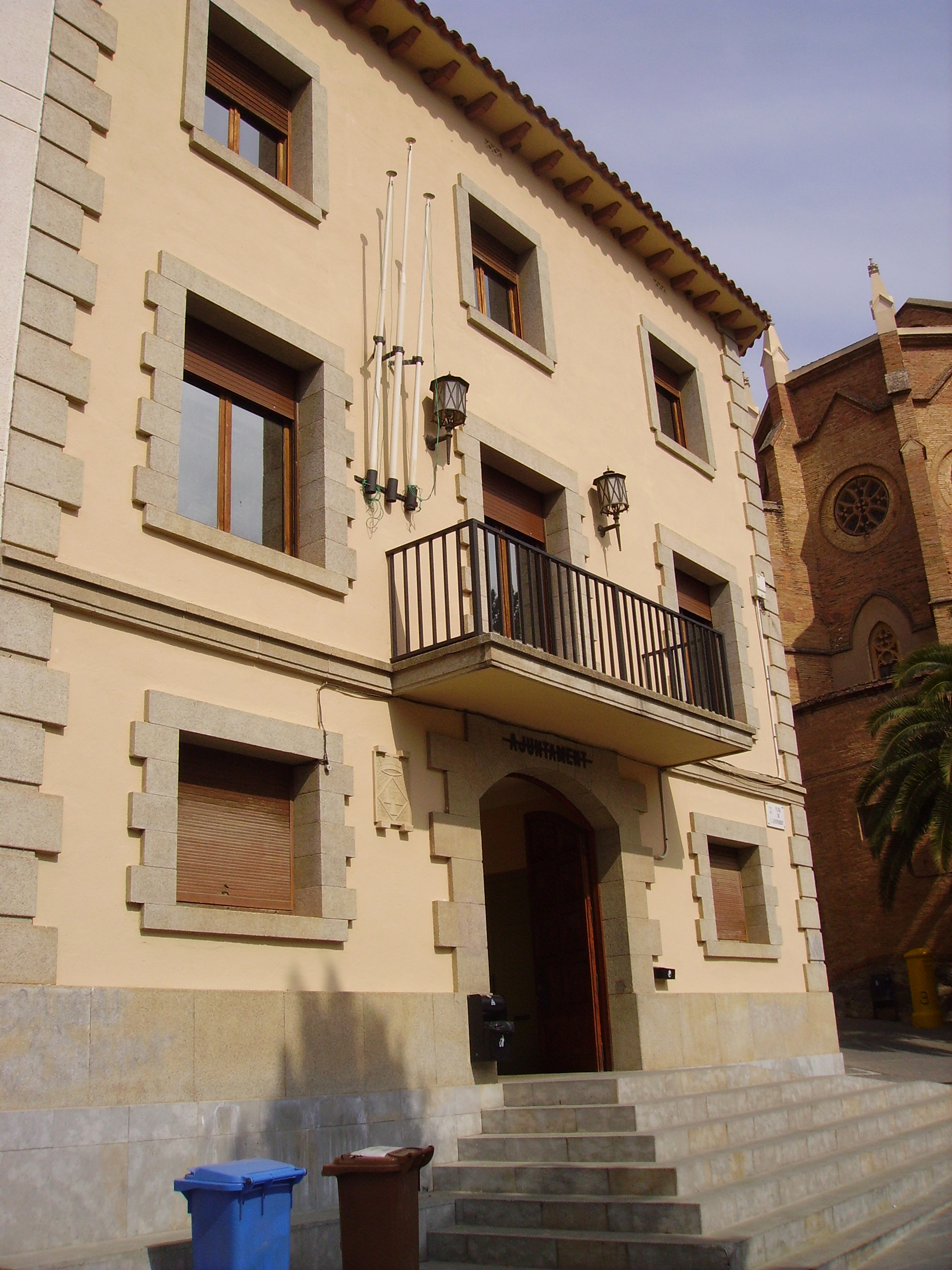 Ajuntament de Torrelles de Llobregat, al Baix Llobregat, Catalunya.